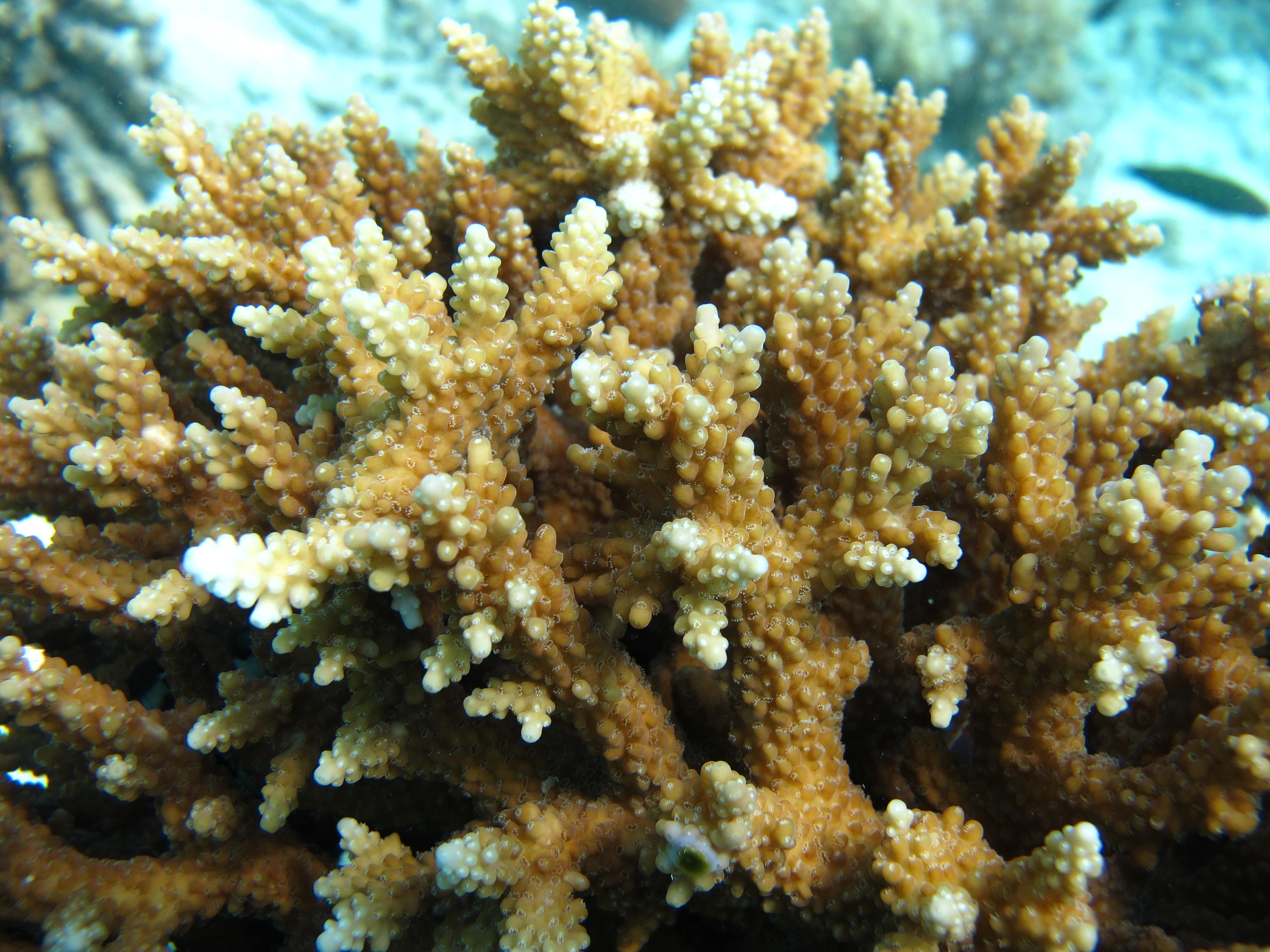 Gros plan sur du corail Acropora latistella aux Maldives (atoll de Baa).